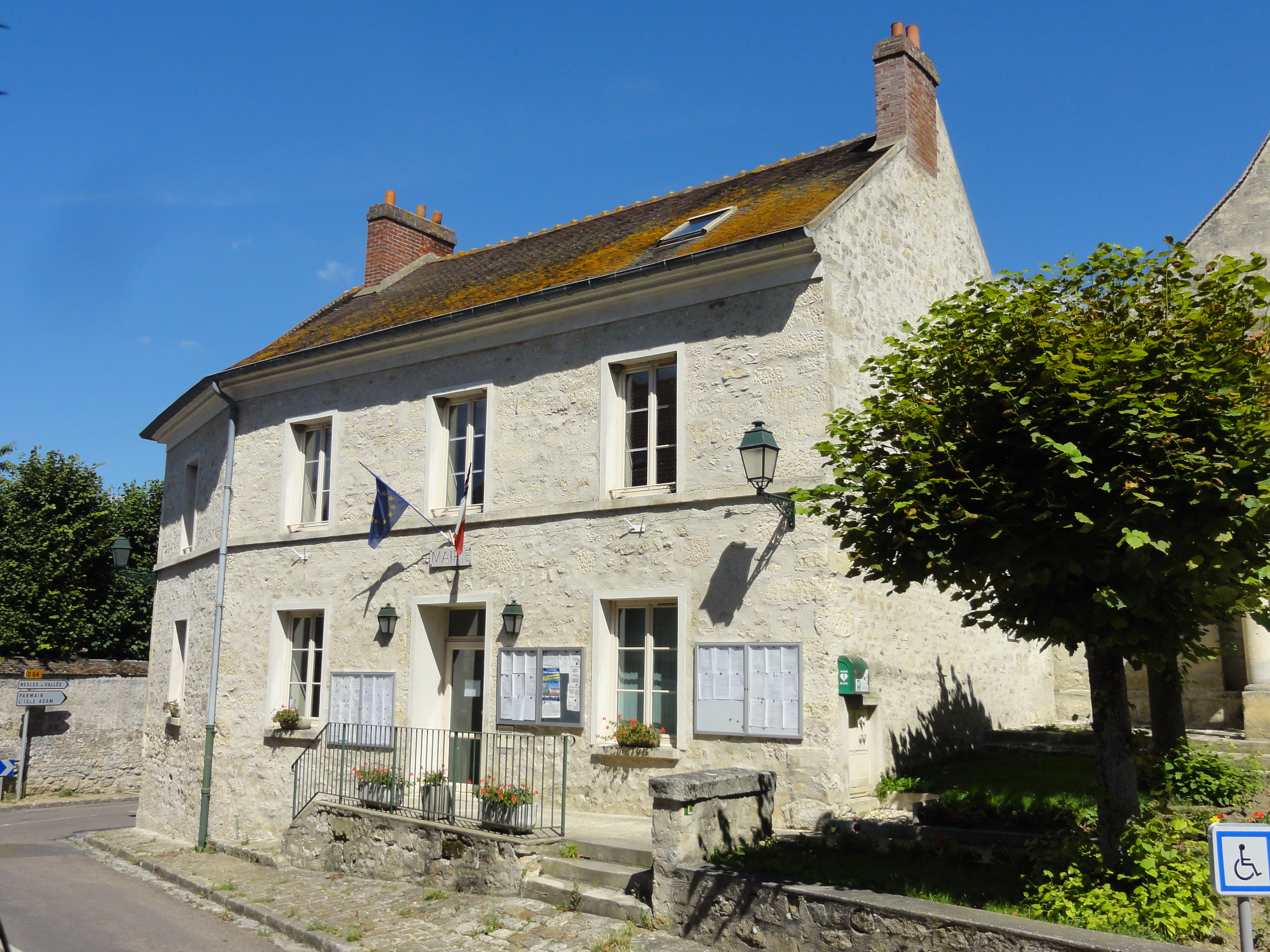 Mairie, Grande-rue.